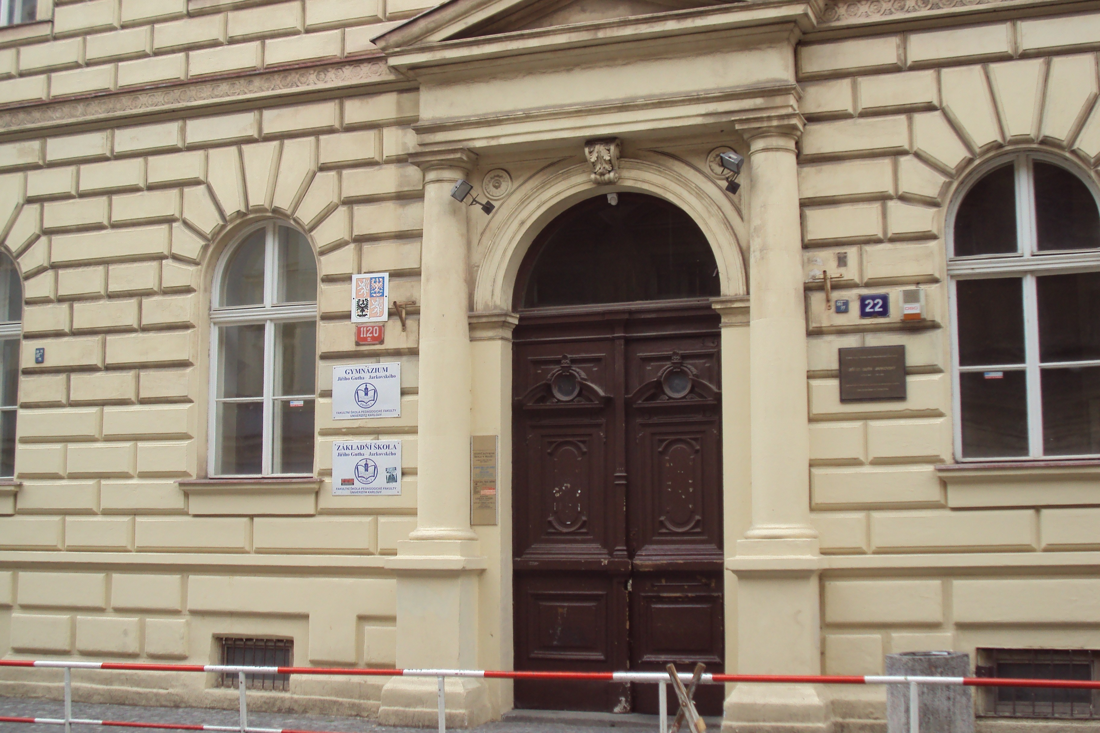 Budova obou škol Jiřího Gutha-Jarkovského je v Truhlářské ulici na Praze 1, foto vchodu